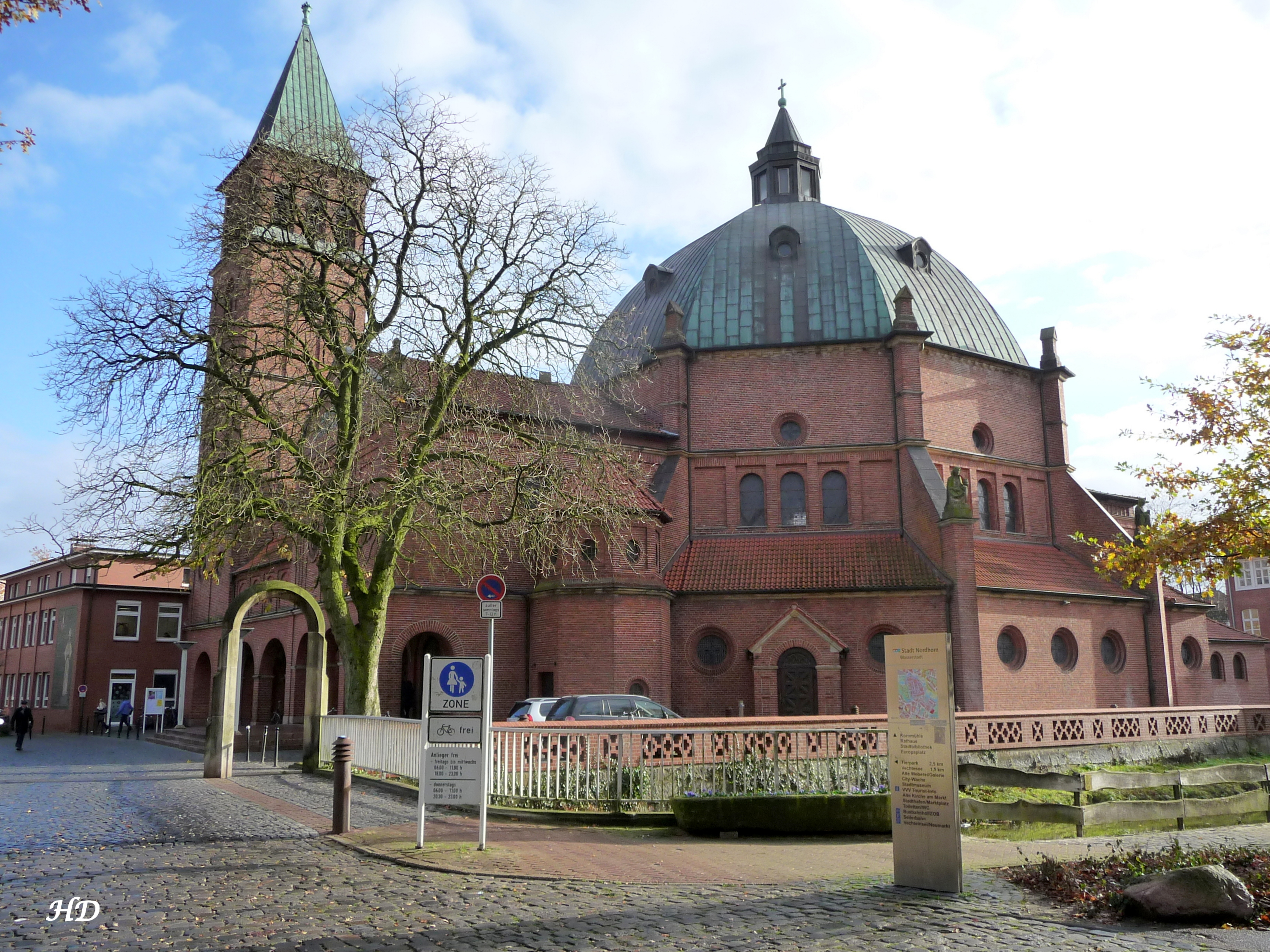 Sankt Augustinus